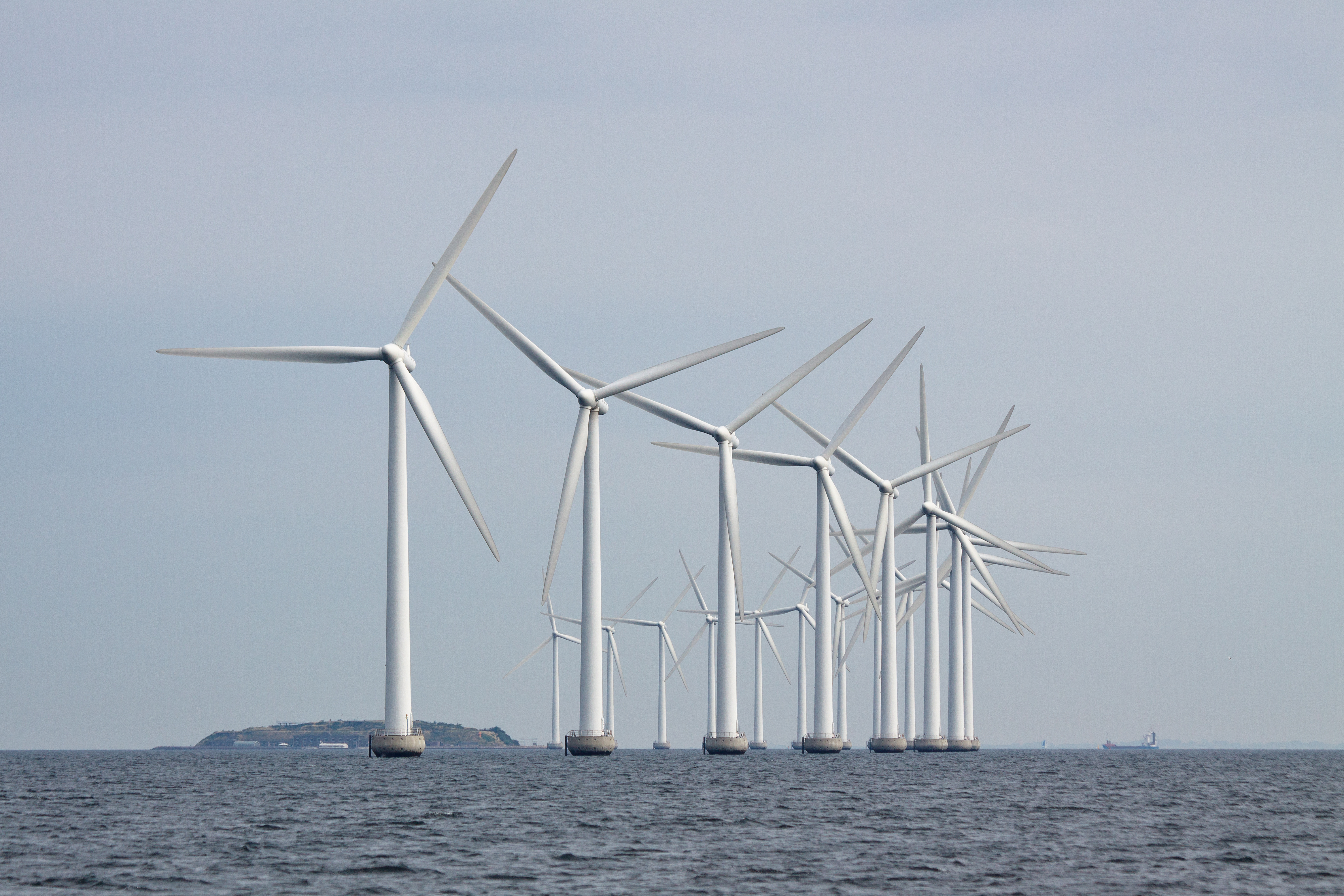 Boattrip 2009